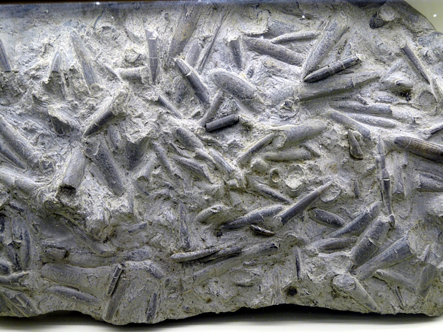 Belemnitenschlachtfeld aus dem Weißen Jura der Fränkischen Alb; Fundort nahe Tüchersfeld/Oberfranken; Exponat im Fränkischen Schweiz Museum Tüchersfeld